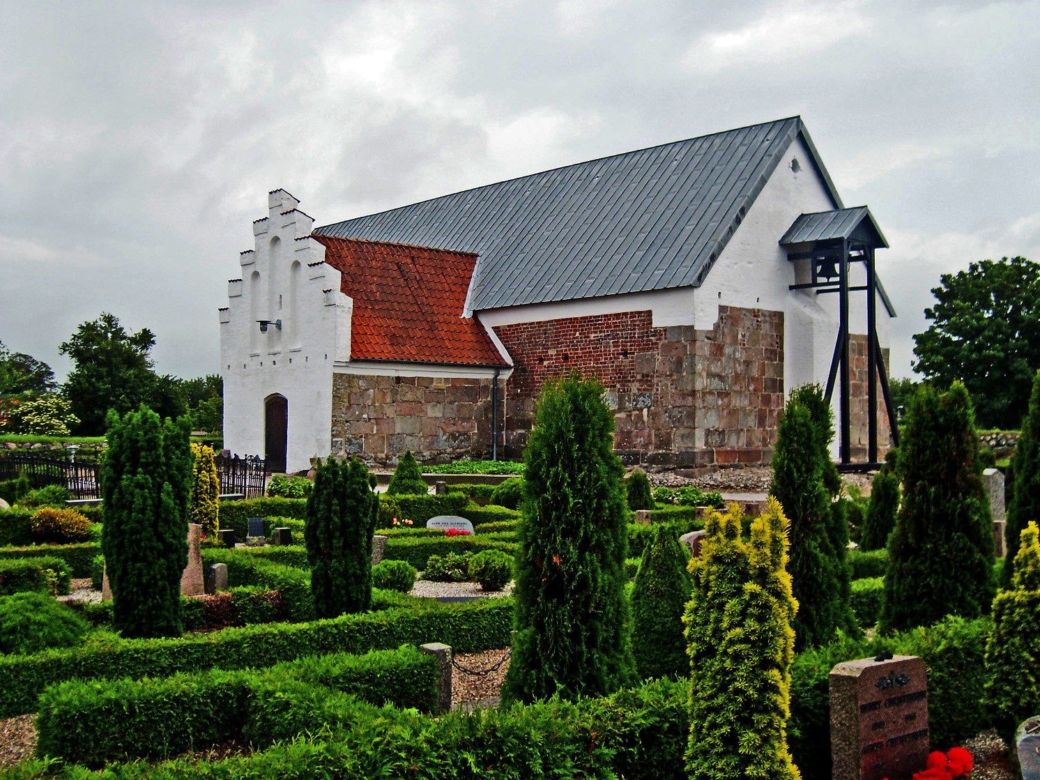 fra nordvest